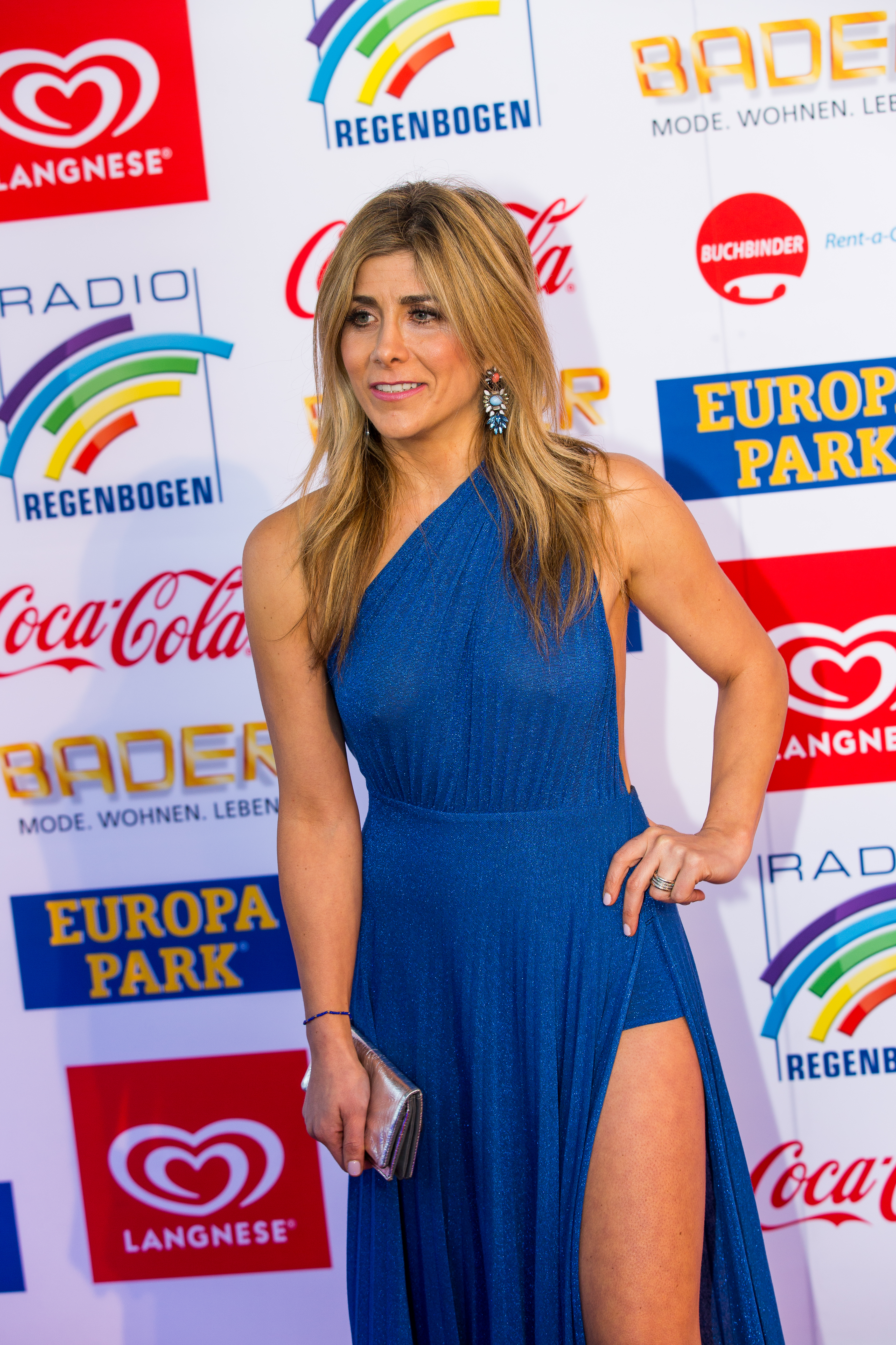 during Radio Regenbogen Award 2017 at Europapark, Rust, Baden-Württemberg, Germany on 2017-04-07, Photo: Sven Mandel